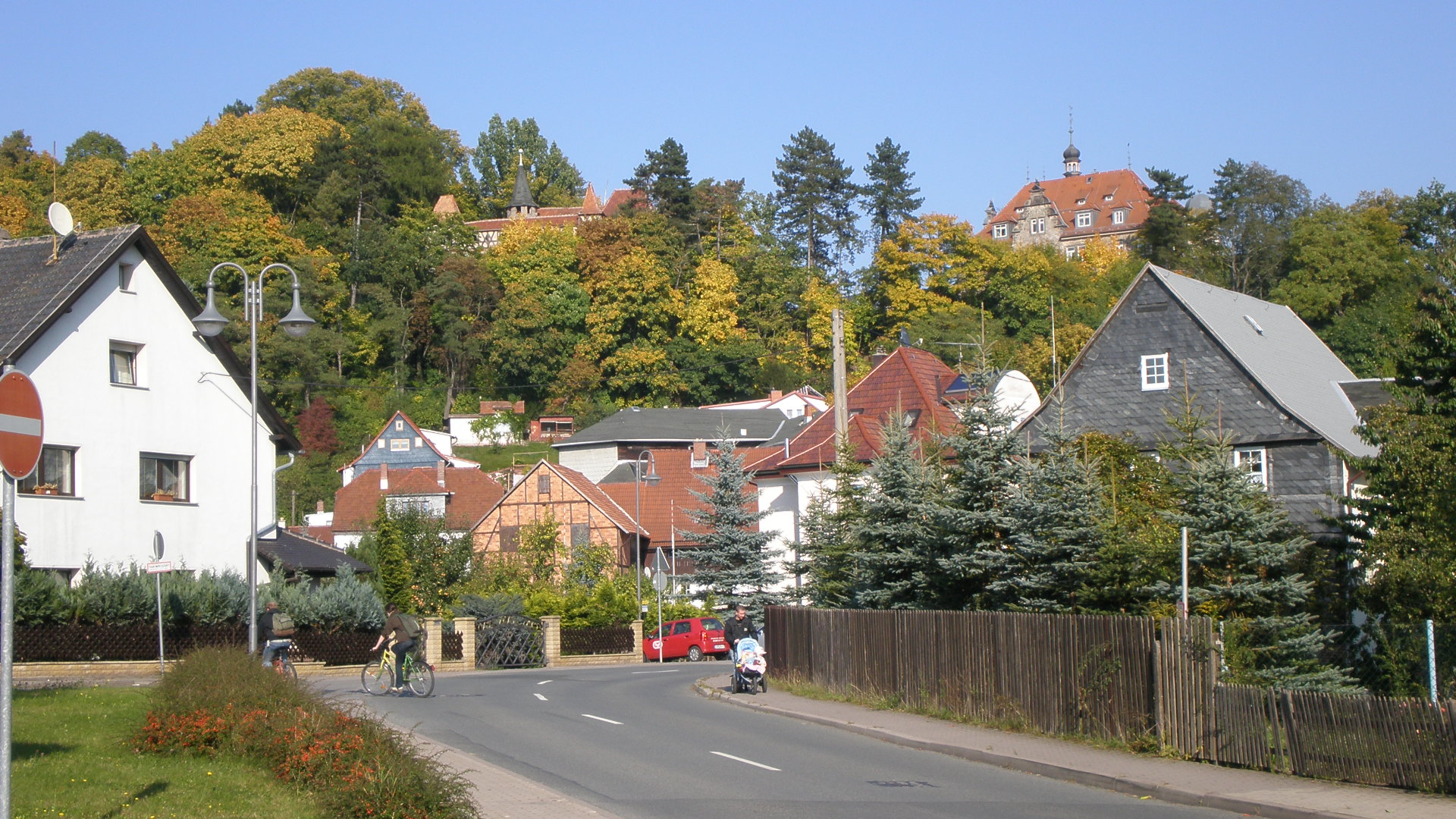 Ansicht Ortswahrzeichen von Neuhaus-Schierschnitz